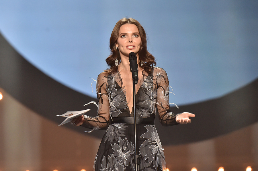 Премия Золотая маска - 2017 года